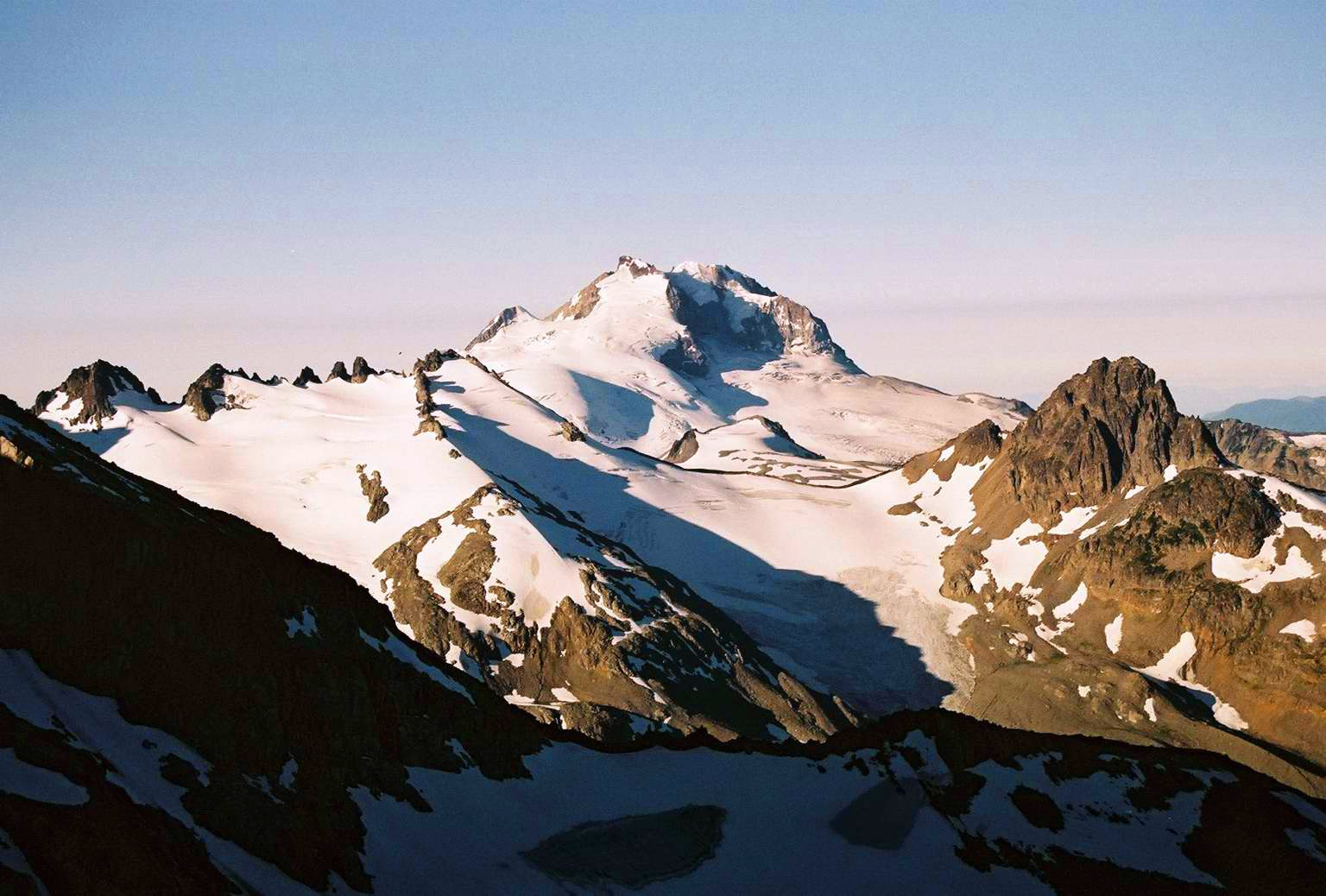 Mount Garibaldi at Dusk